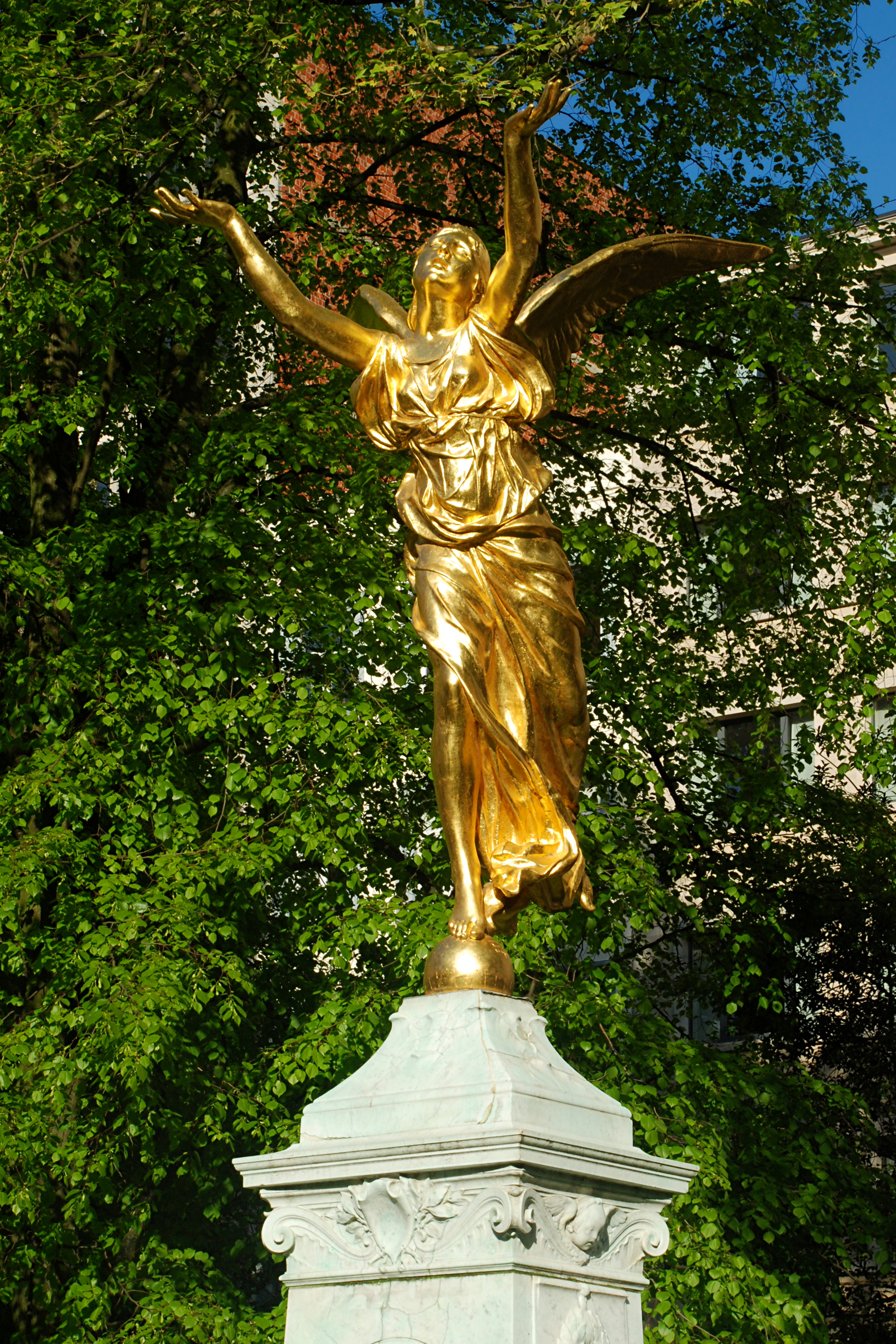 Belgique - Bruxelles - Monument Julien Dillens